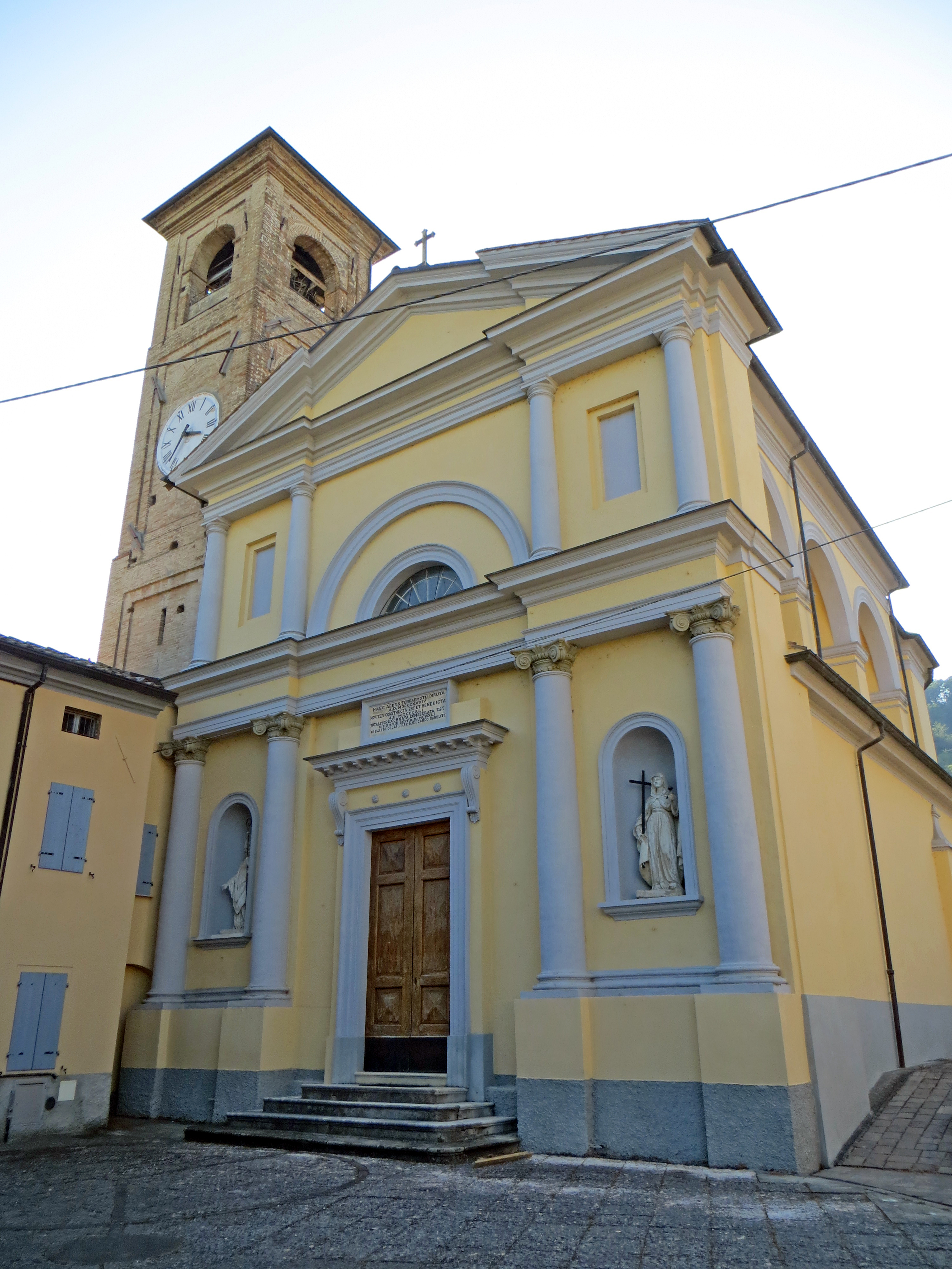 Chiesa di San Vitale (San Vitale Baganza, Sala Baganza) - facciata This is a photo of a monument which is part of cultural heritage of Italy.